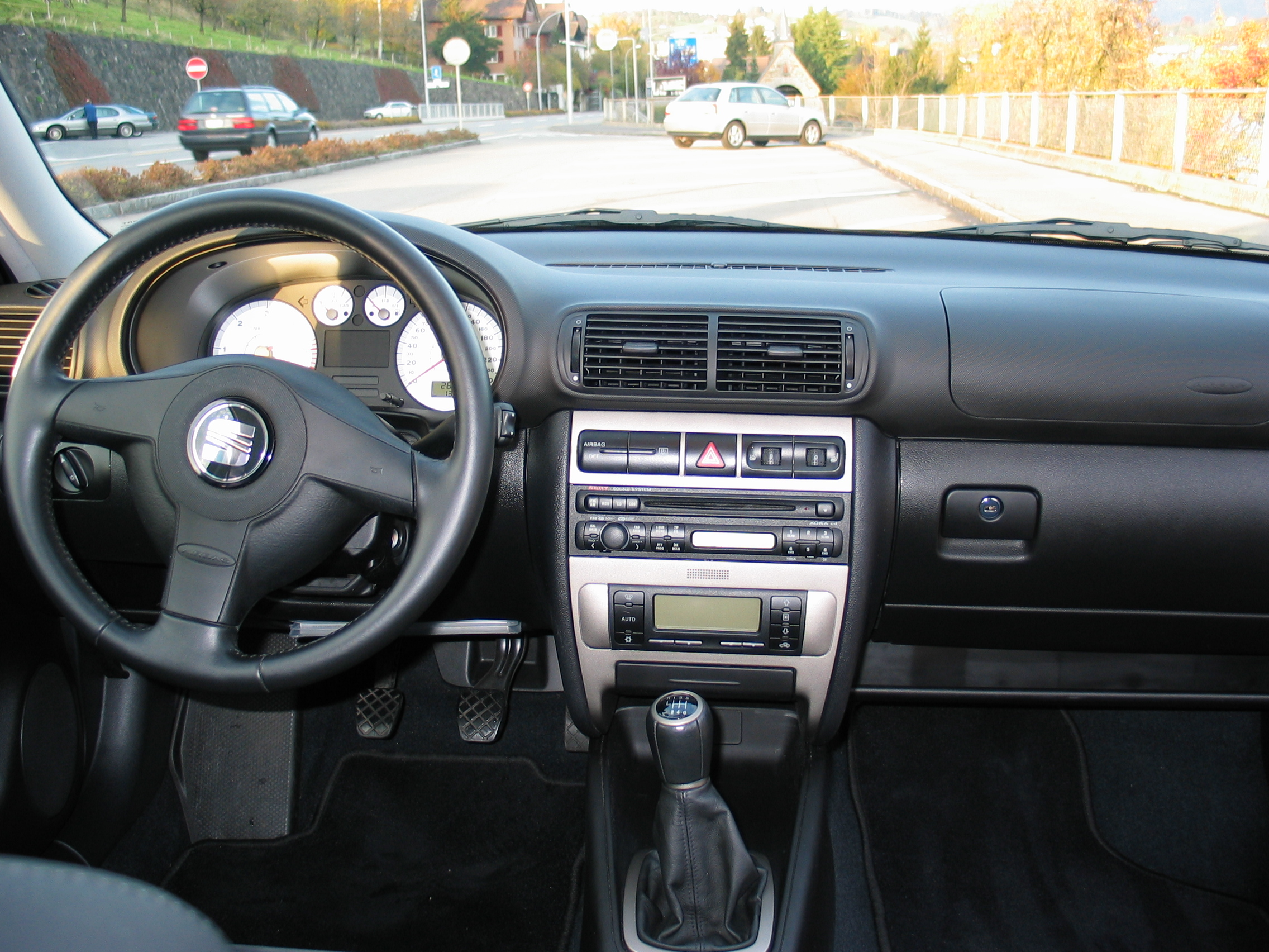 SEAT Leon Mk1 dashboard